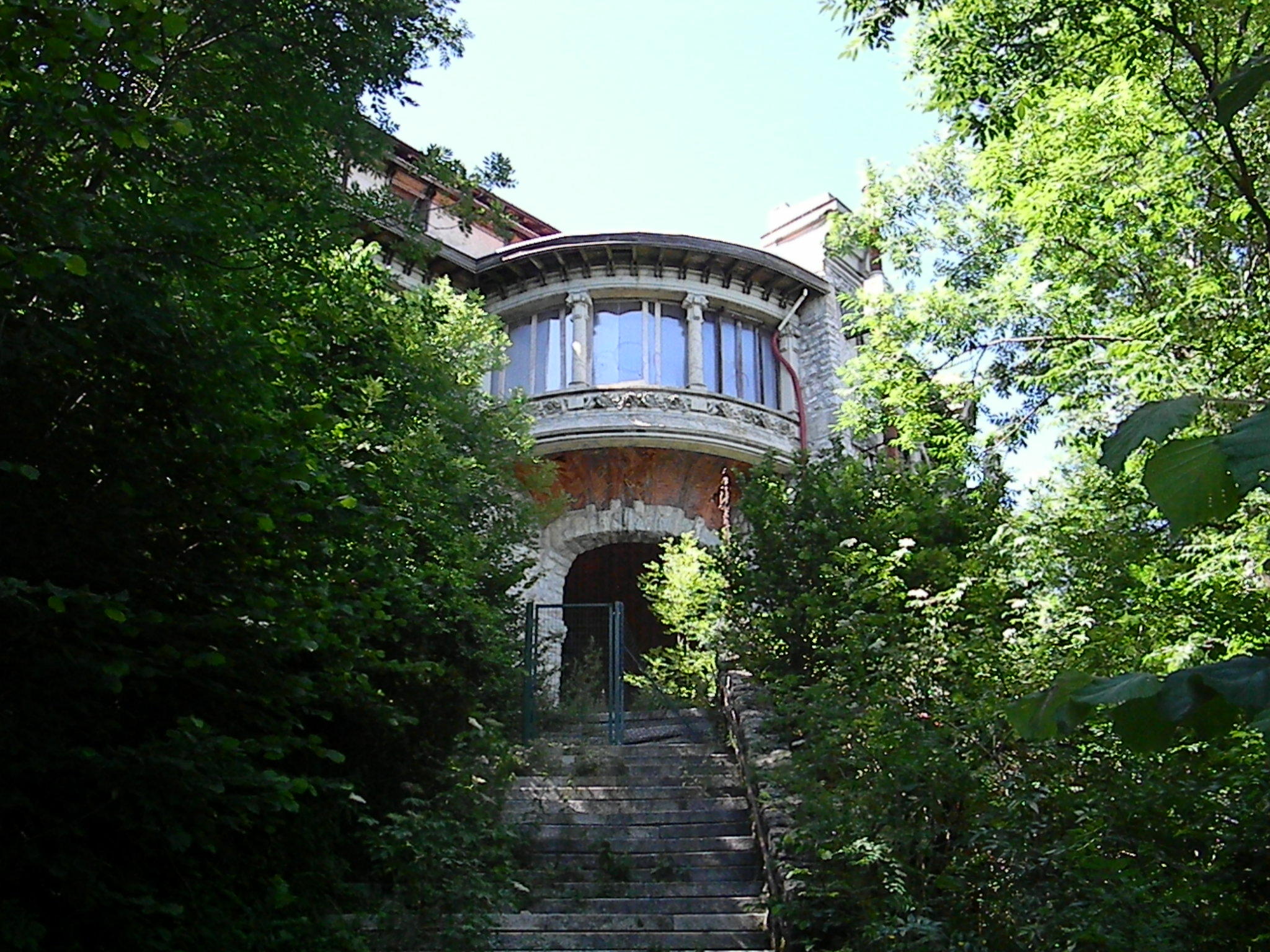 Scorcio sul Ristorante Belvedere del Campo dei Fiori di Varese